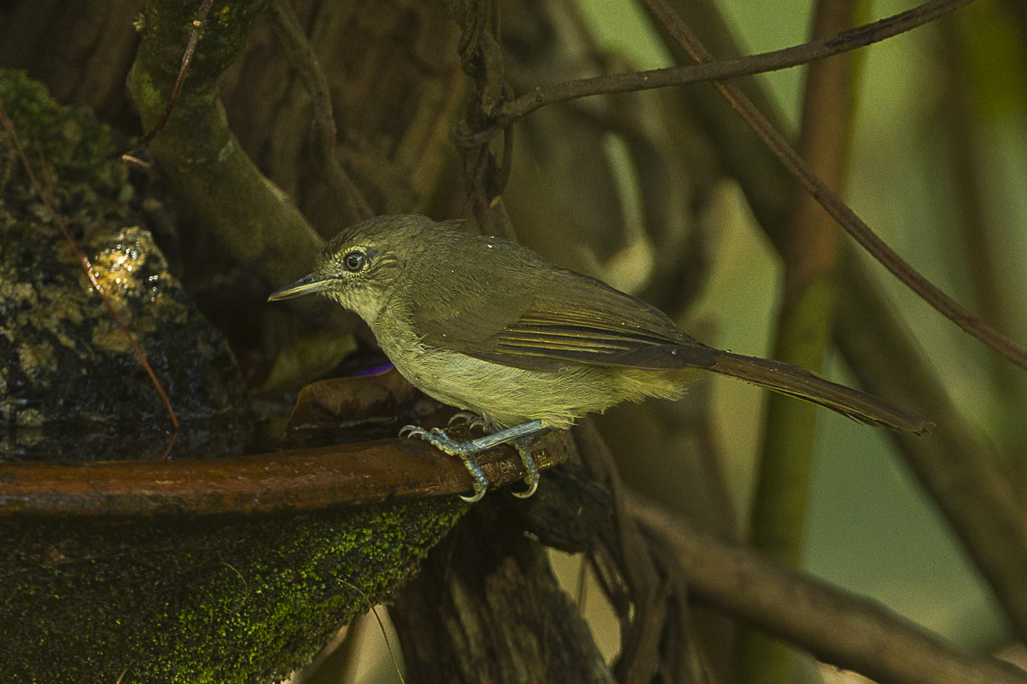 Placid Greenbul - Malawi_S4E4473